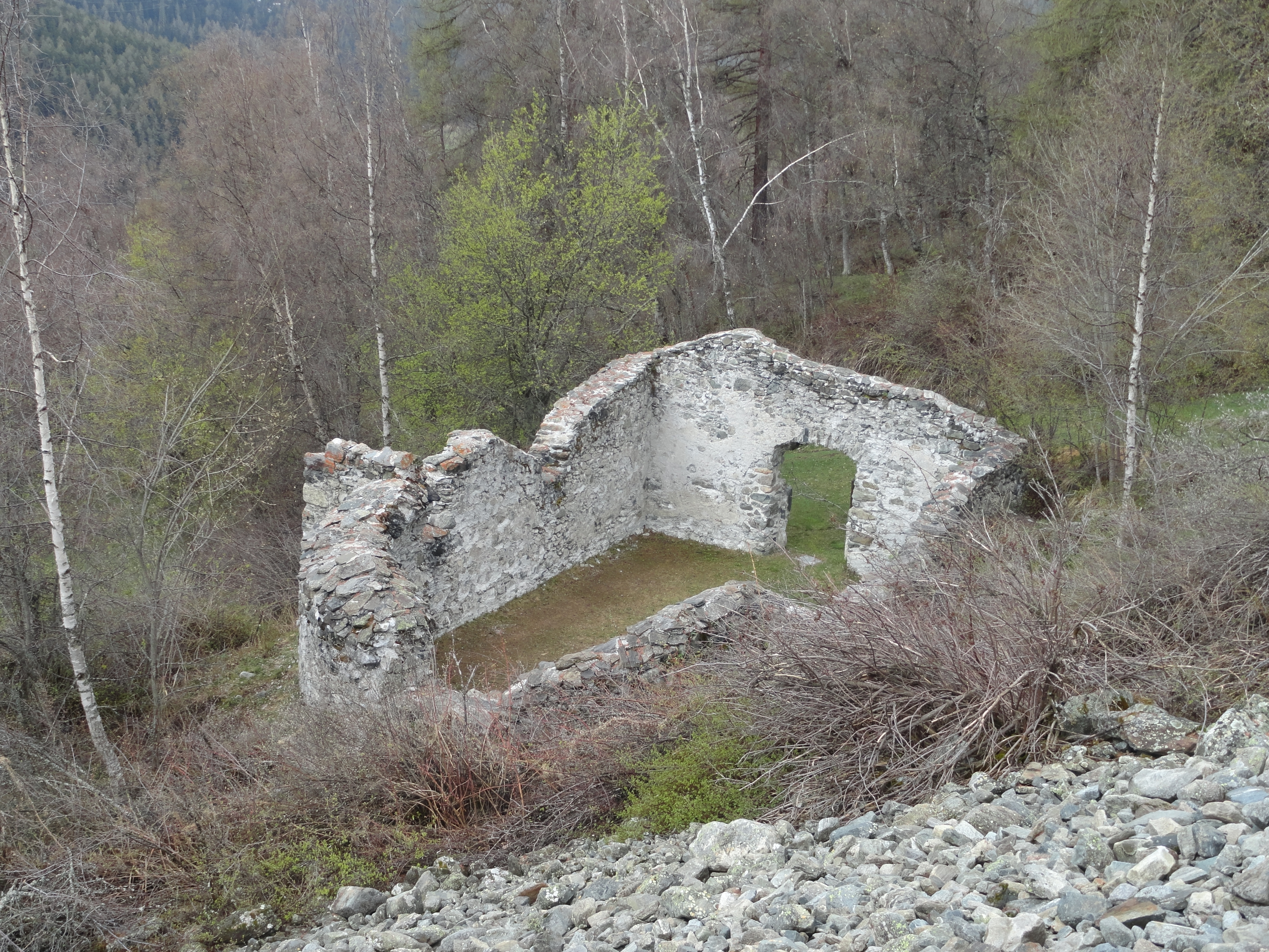 Gonda (Lavin) Blick auf die Kirche